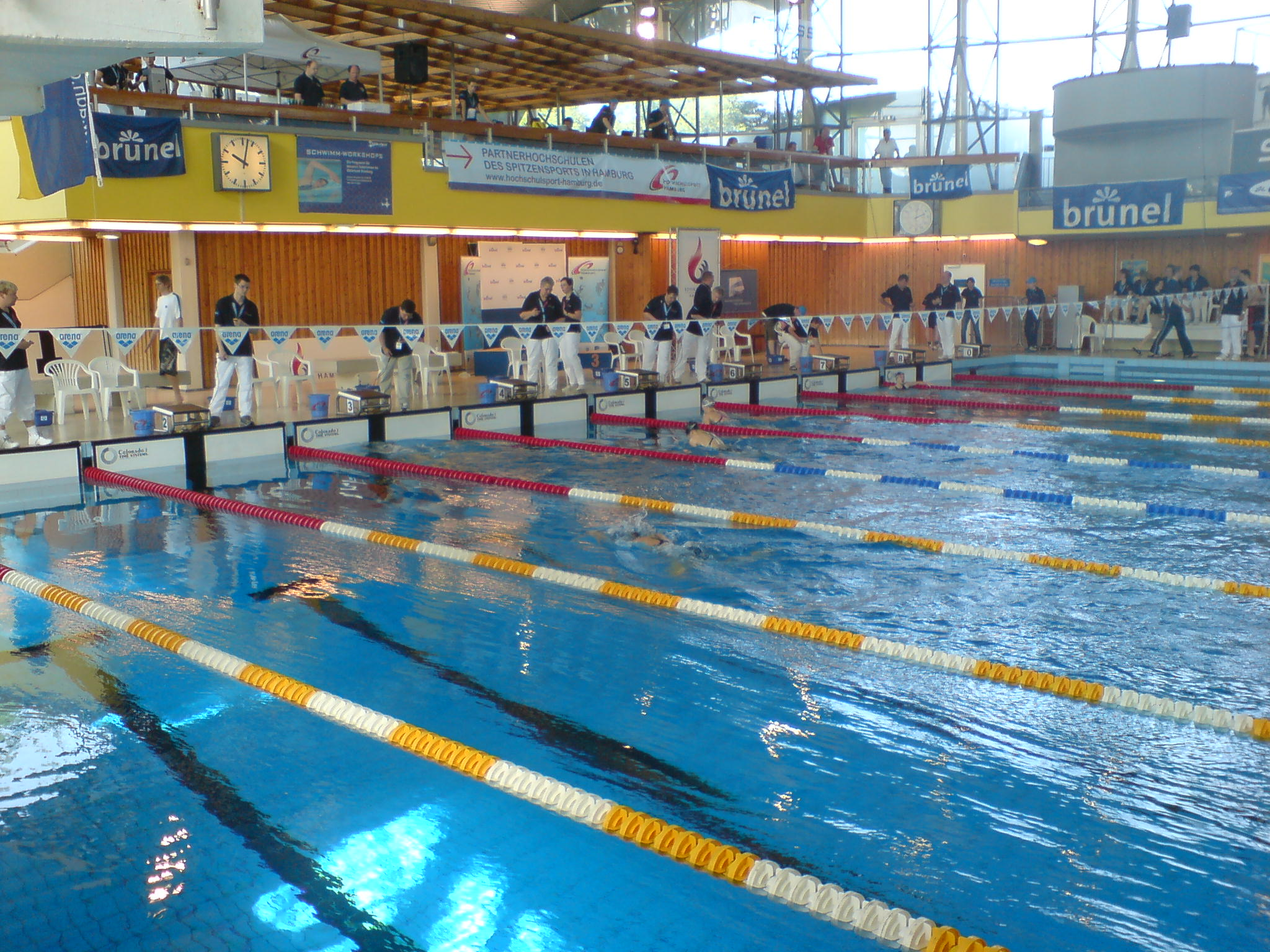 Deutsche Hochschulmeisterschaften Schwimmen 2007, 11.-13. Mai in Hamburg, Alsterschwimmhalle.